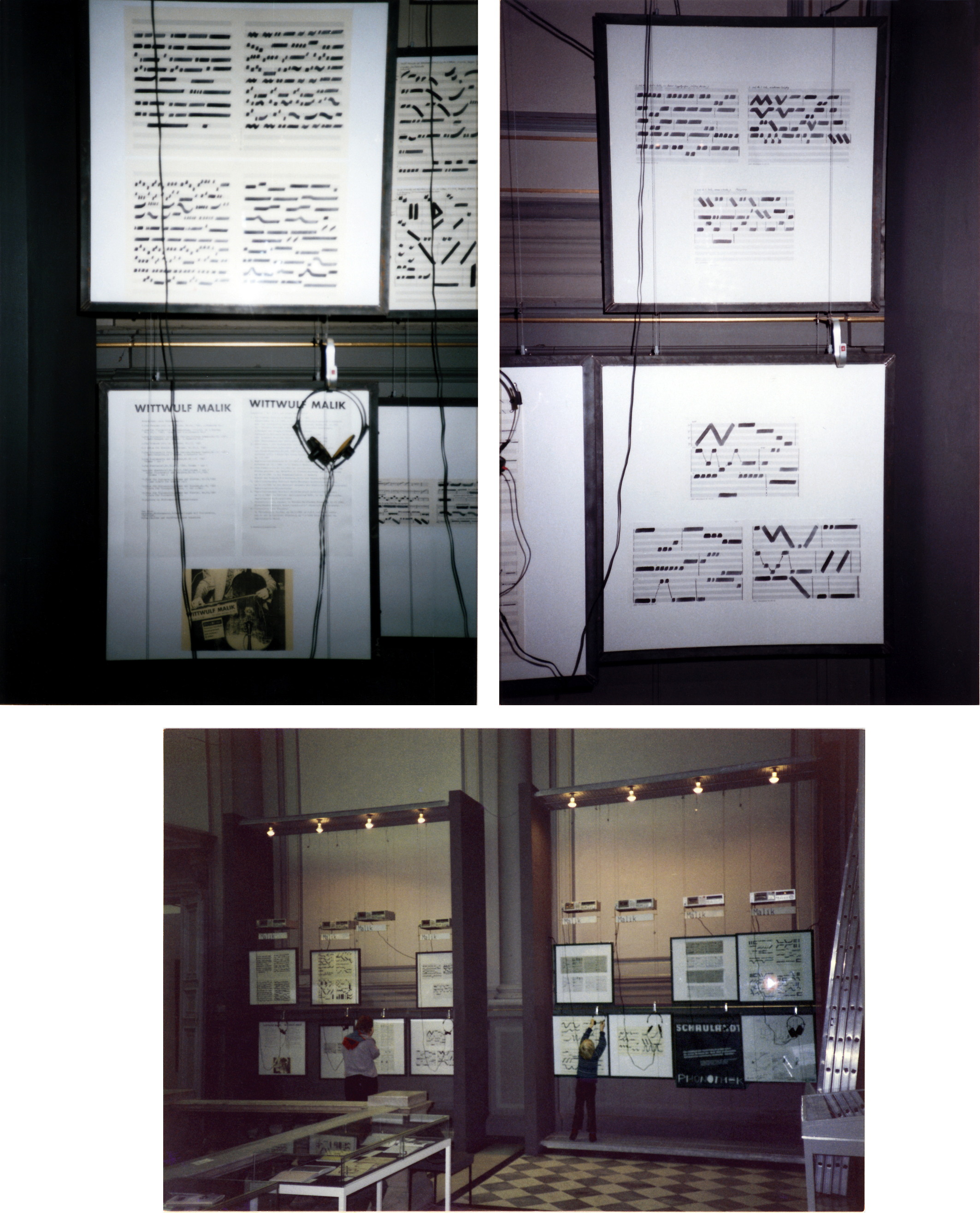 1984 - Grafische Notationen in der Phonothek der Hamburger Kunsthalle (im Treppenhaus des Altbaus), Fotografie von Wittwulf Y Malik